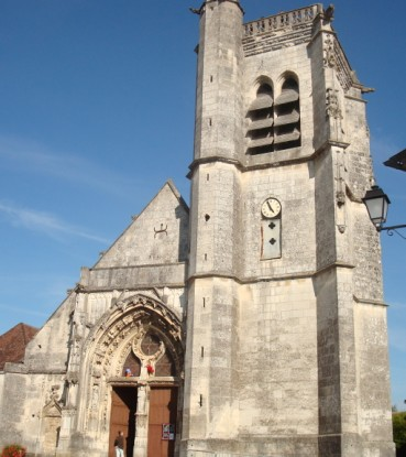 Eglise de Thury prise de la Route de Saint Sauveur